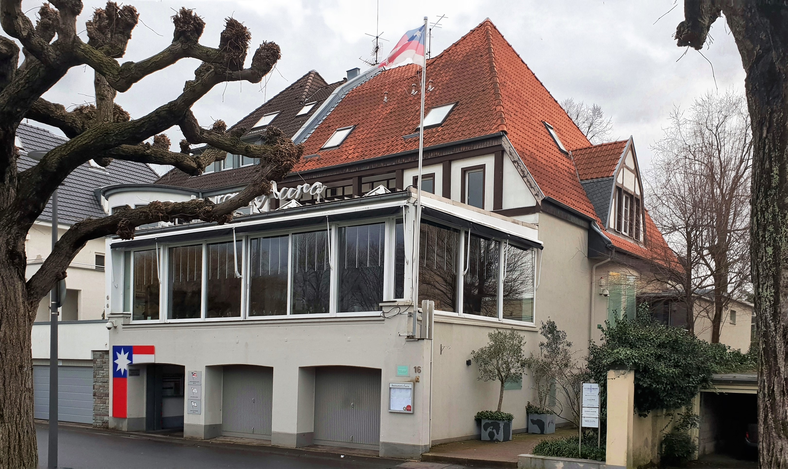 Vorderhaus des Vereinsgeländes der Kölner Rudergesellschaft 1891 am Rheinufer im südlichen Kölner Stadtteil Rodenkirchen.